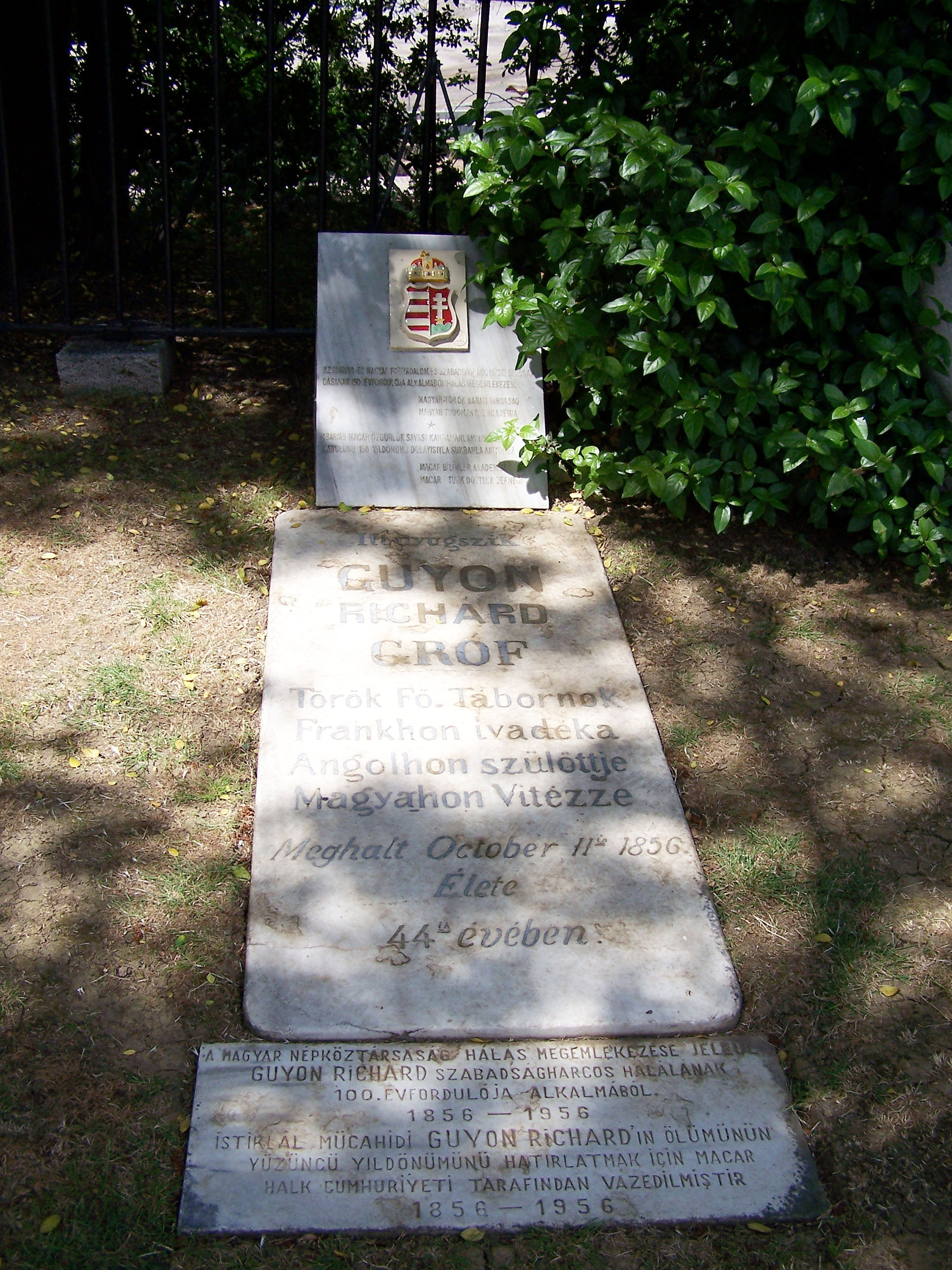 Grave of Richard Guyon at Haydarpaşa Mezarlığı